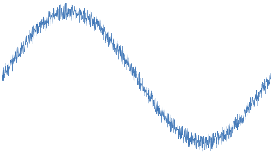 Señal con dither para cuantificar posteriormente a 4 bits (SNR: 21,03 dB).